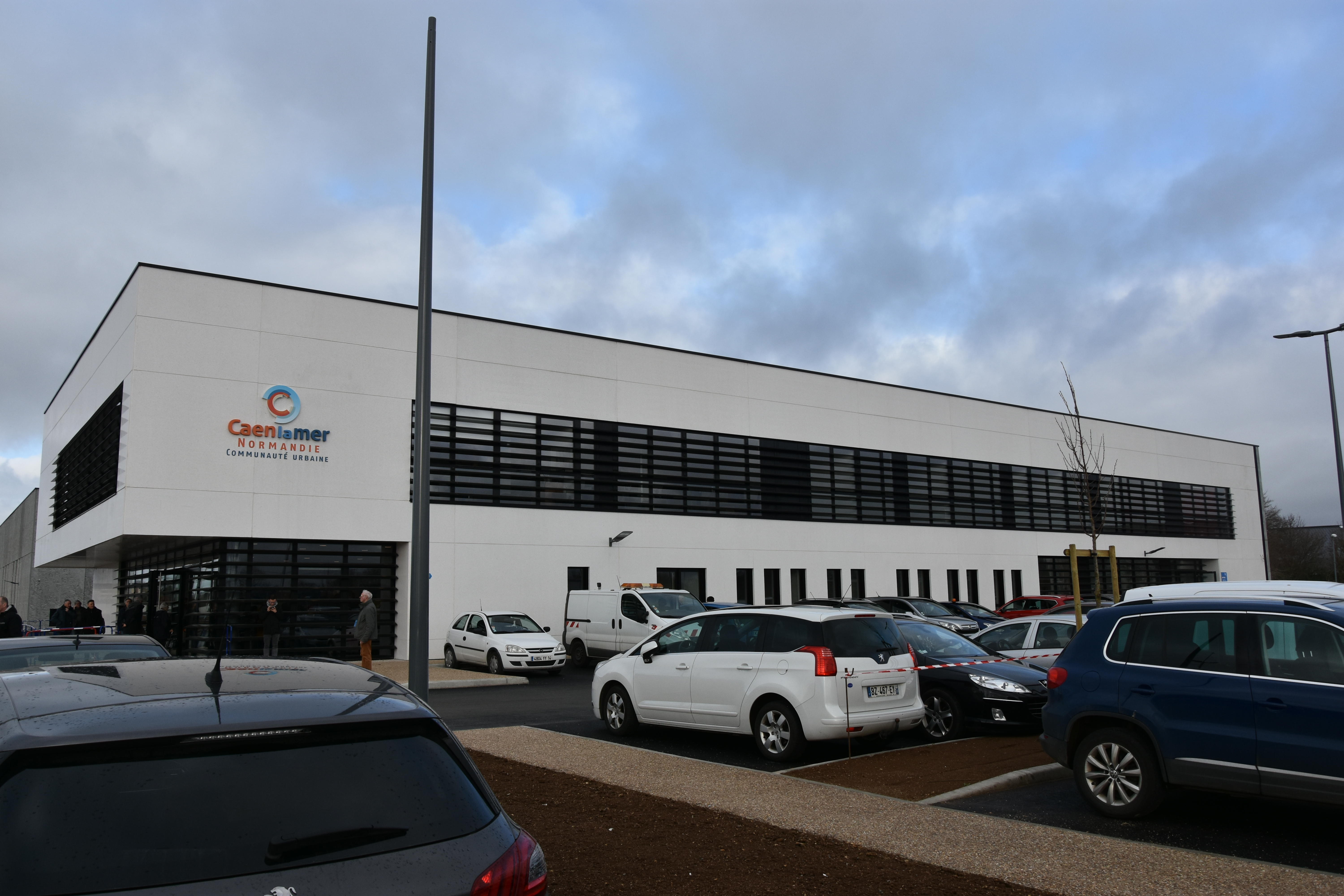 le centre d'exploitation et de maintenance du tramway de Caen lors de la journée portes ouvertes du 2 mars 2019